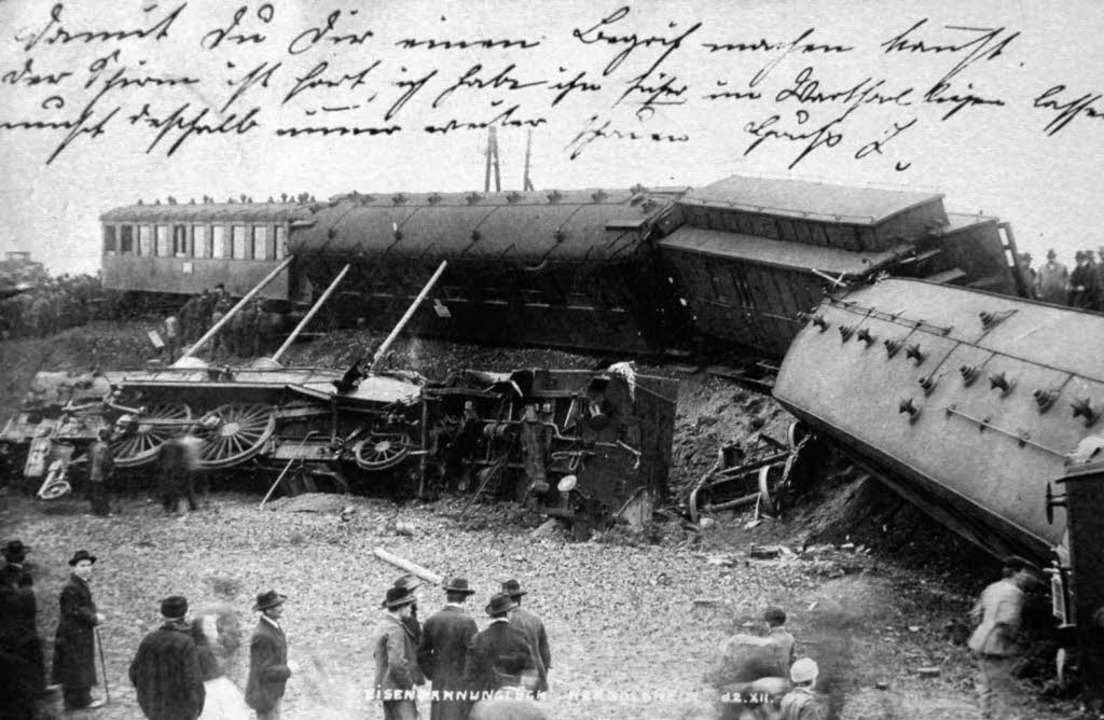 Photo - Zugunglück in Herbolzheim